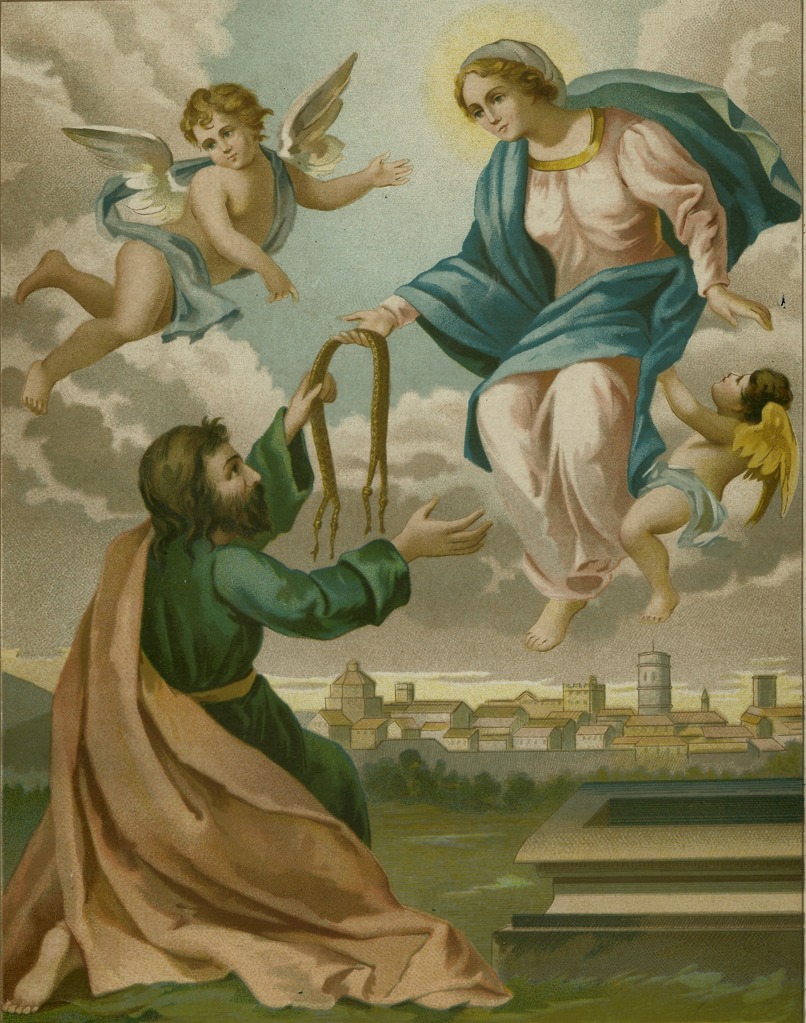 Maria Santissima assunta in cielo in atto di dare il suo preziosissimo cingolo all'apostolo San Tommaso. The Virgin Mary gives the 'sacred girdle' to Saint Thomas the Apostle